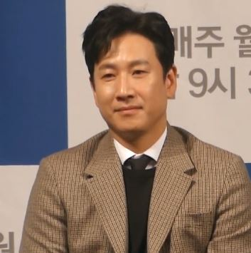 16일 오후 서울시 강남구 논현동 임피리얼팰리스서울 호텔에서 JTBC 새 월화드라마 '검사내전' 제작발표회가 열려 배우 이선균X정려원X이성재X김광규X이상희X전성우가 참석해 기자 질의 응답을 하고 있다.